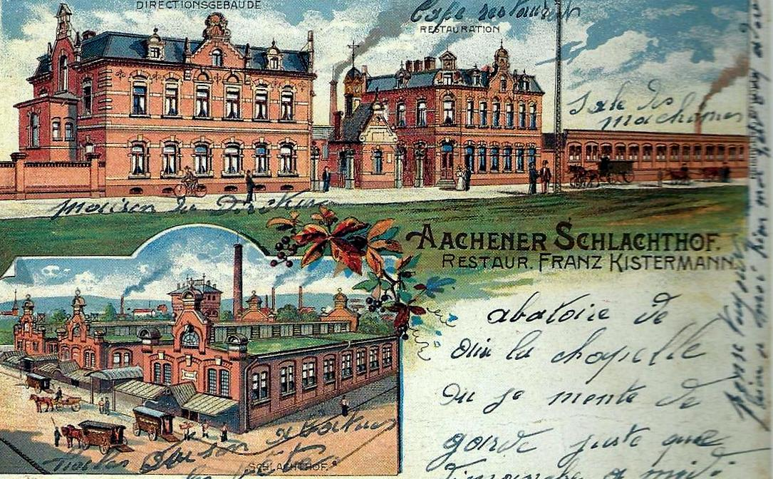 historische Aufnahme des Alten Schlachthofes in Aachen um 1900, da die 1904 errichtete Verbindungshalle noch nicht in der Zeichnung enthalten ist